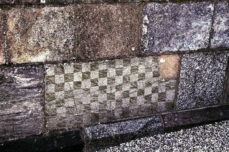 Bislev Kirke, Aalborg Kommune, set fra nordmur